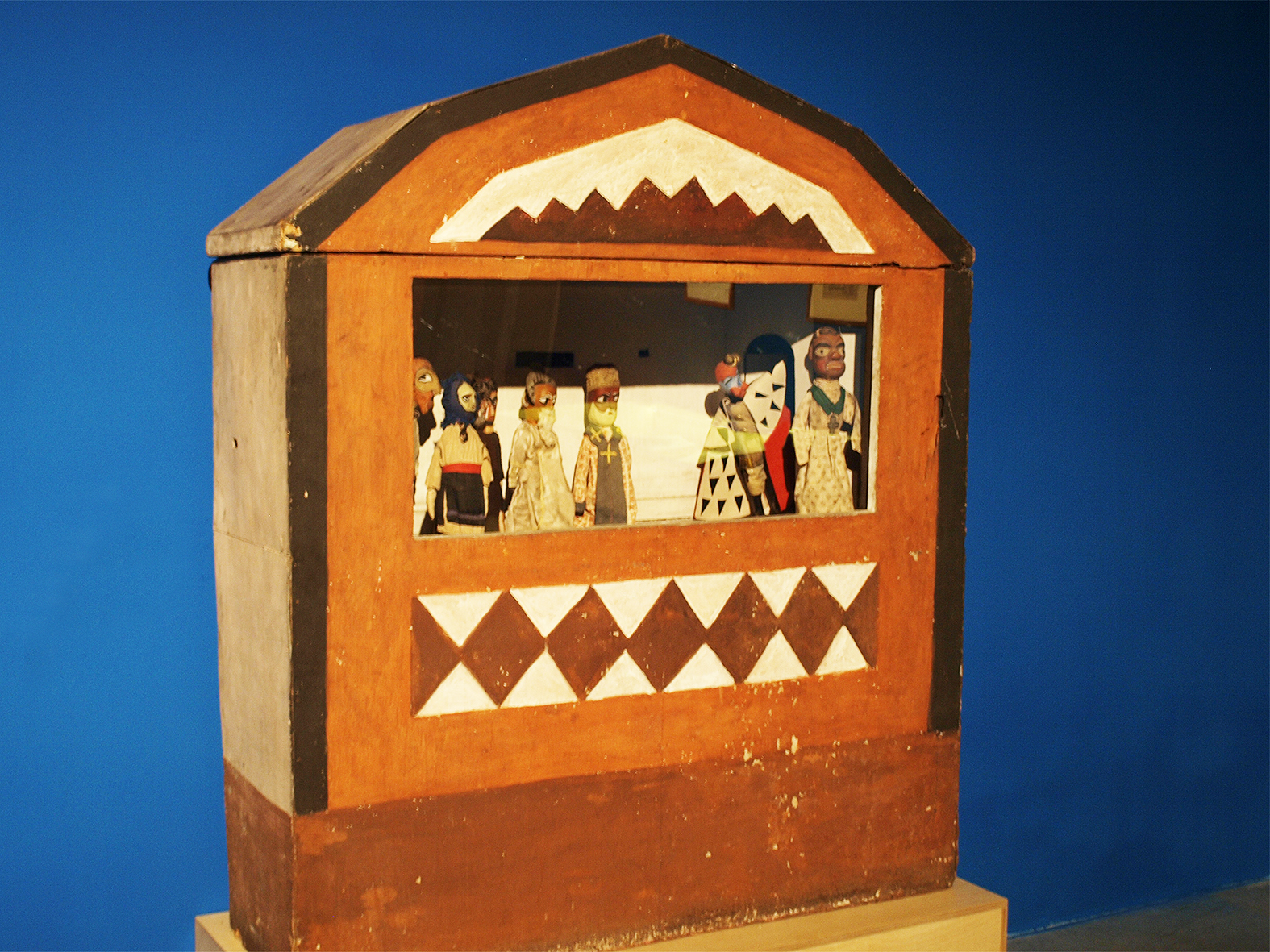 Вертеп Межигірського лялькового театру. Дерево, фарби, різблення. Музей театрального, музичного та кіномистецтва України